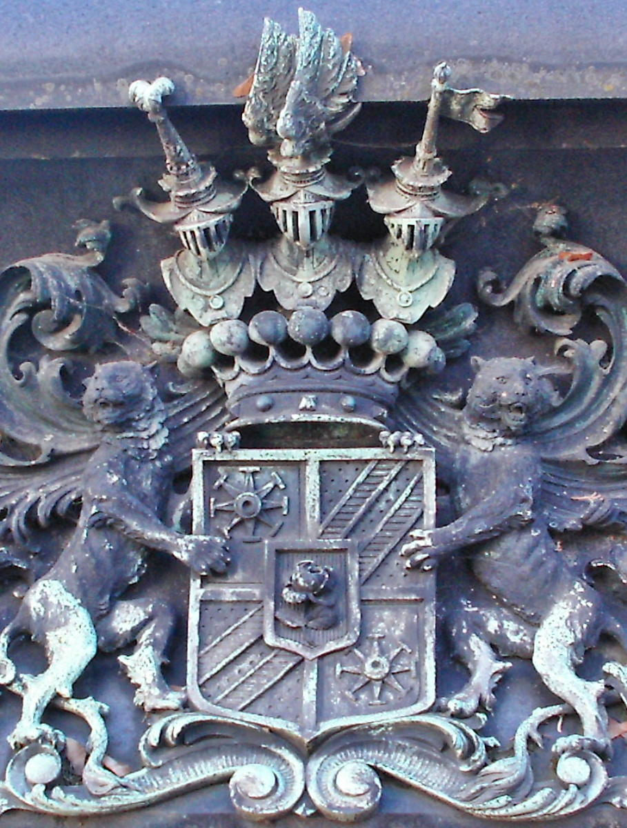 Wappen der Reichsgrafen Basselet von La Rosée, vom Grabstein eines Familienmitgliedes, Hauptfriedhof Mannheim